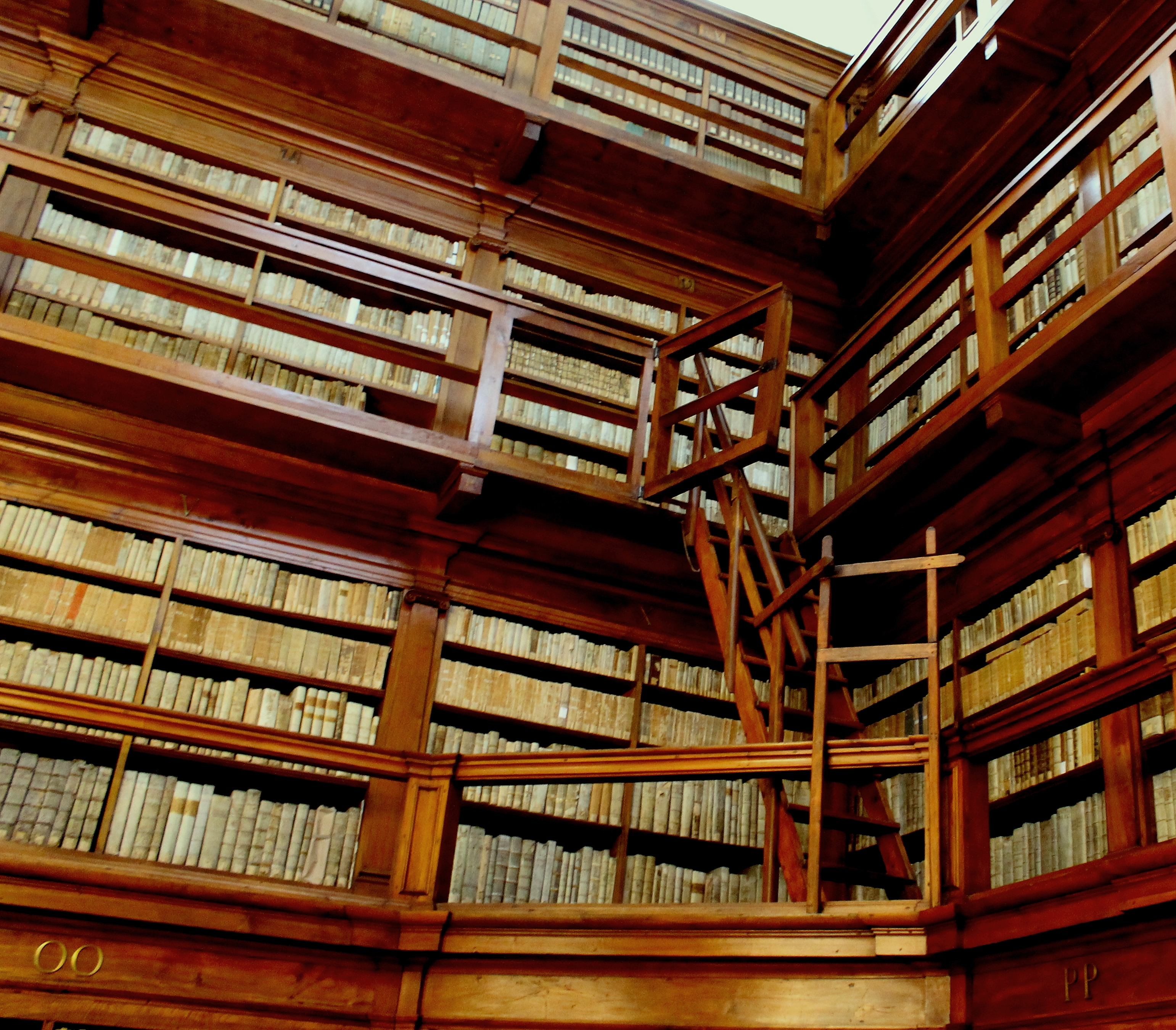 Biblioteca Teresiana This is a photo of a monument which is part of cultural heritage of Italy.